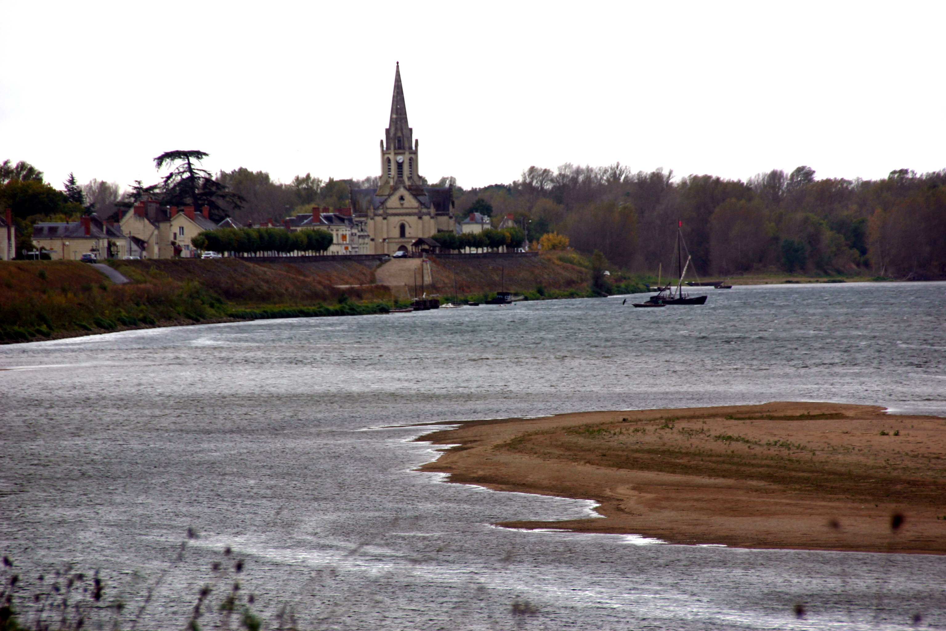 Bréhémont